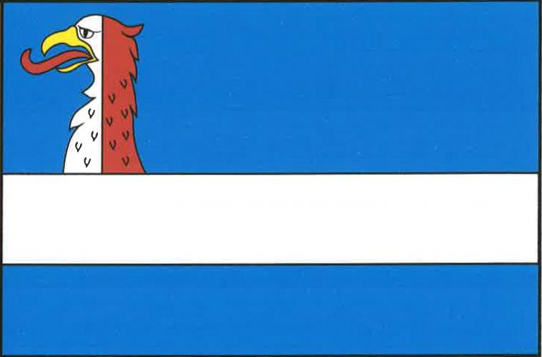 Zdislavice vlajka